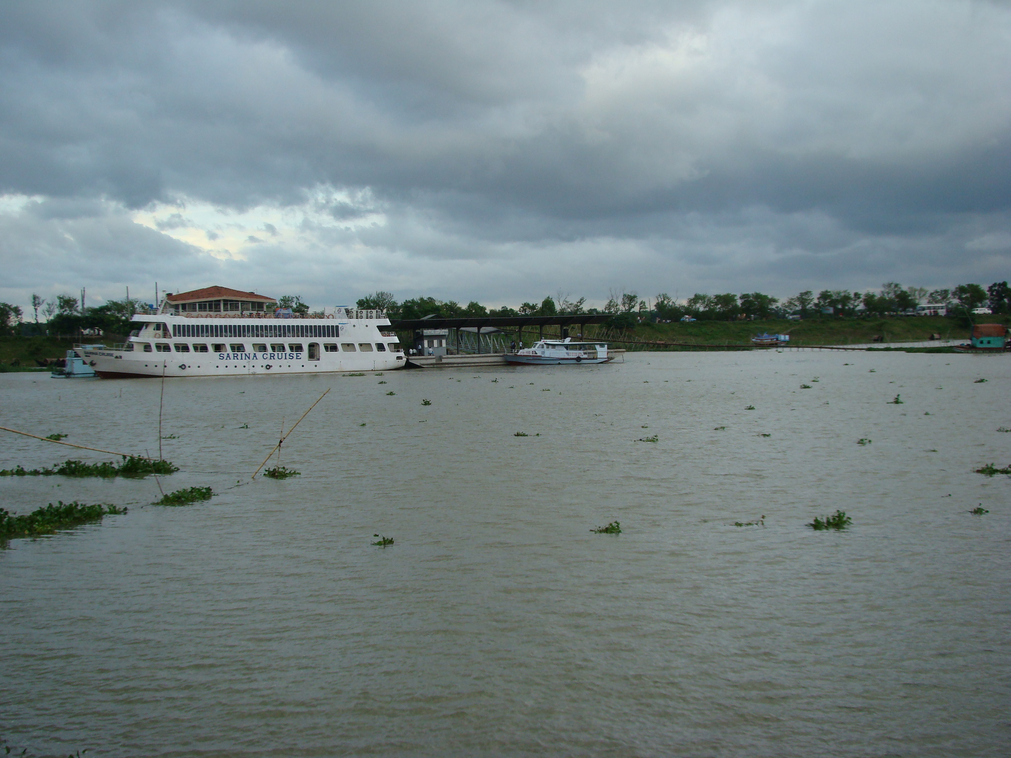 Ashulia Dhaka Bangladesh